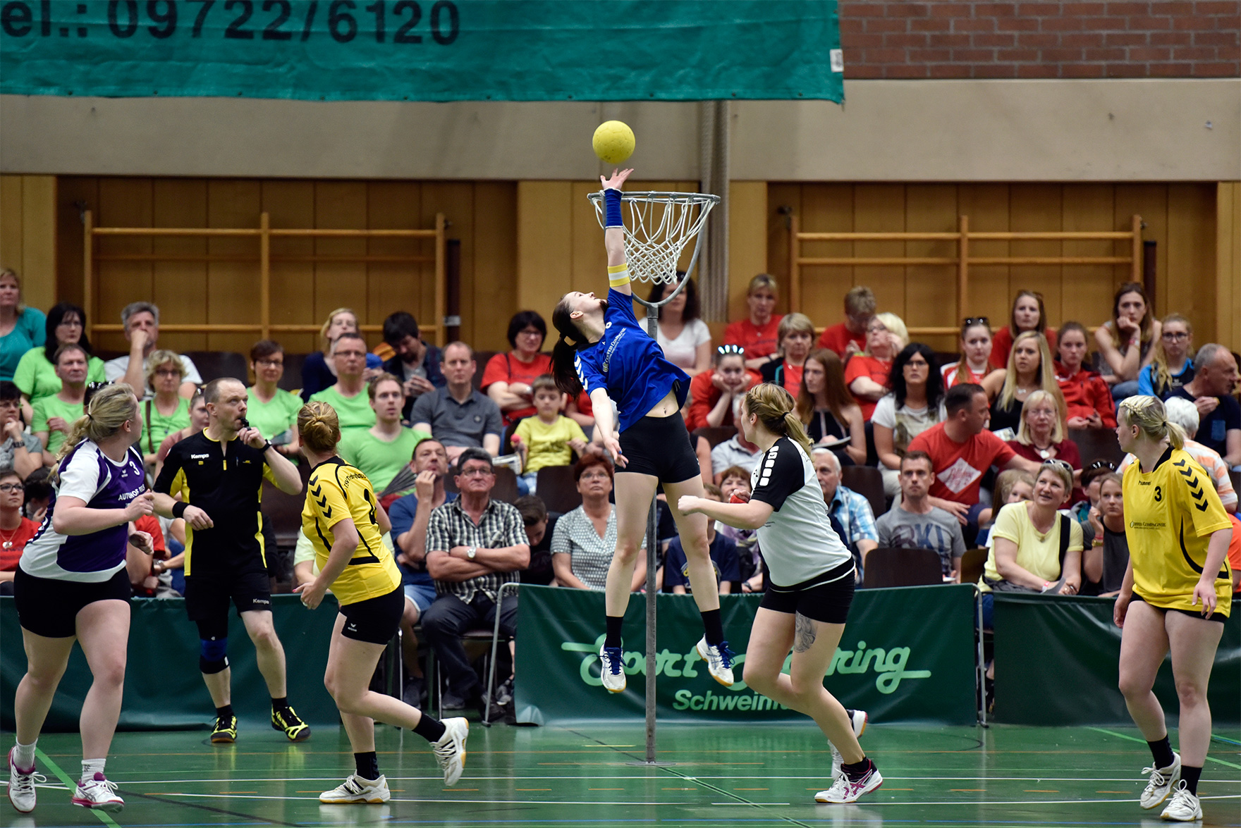 Korbhüterin Agnetha Rippe vom TSV Thedinghausen beim Abfangen eines Balles im Spiel gegen die SG Findorff um Platz 5 bei den Deuschen Meisterschaften im Hallenkorbball 2016 in Sennfeld.